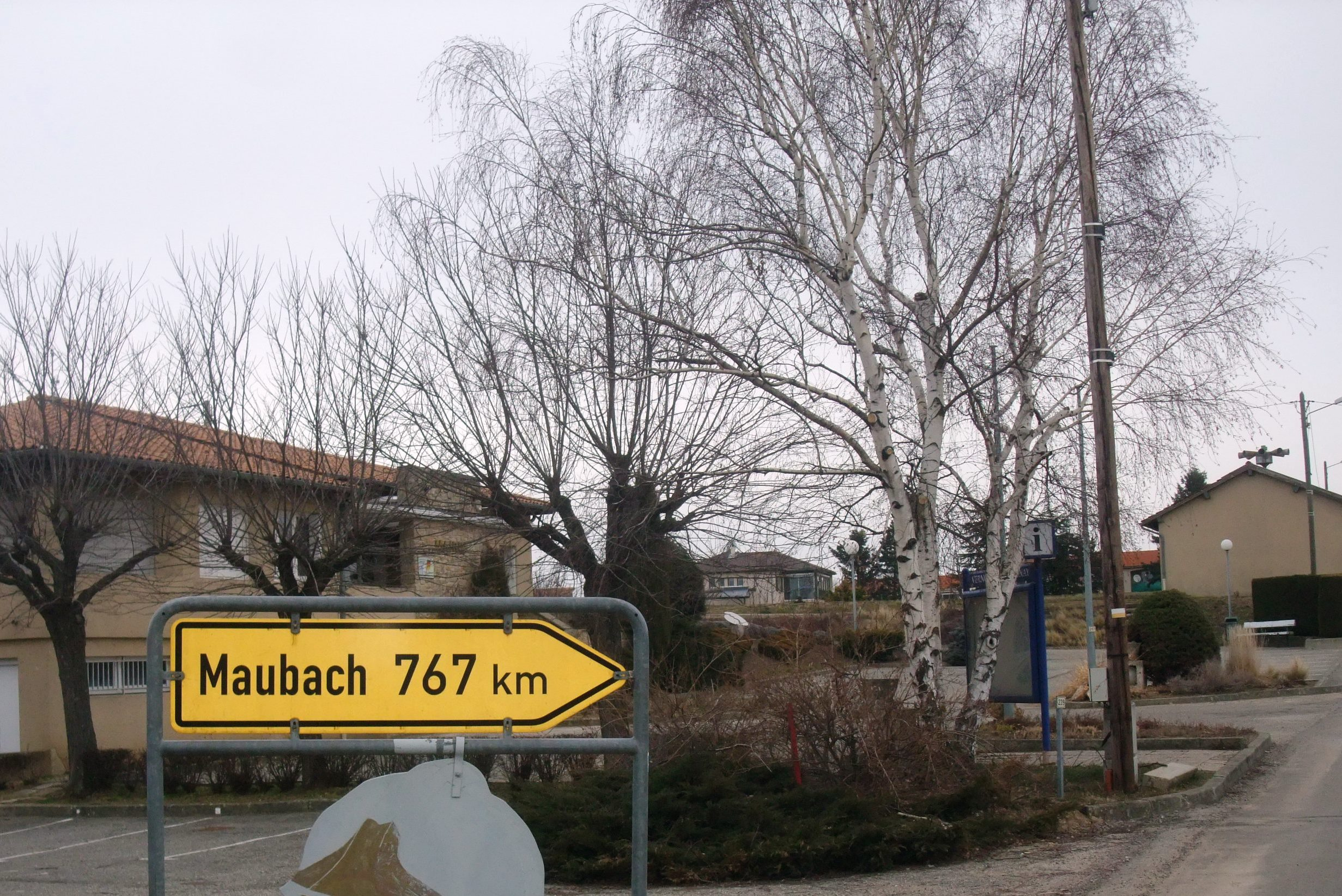 Vernosc mairie pancarte Maubach